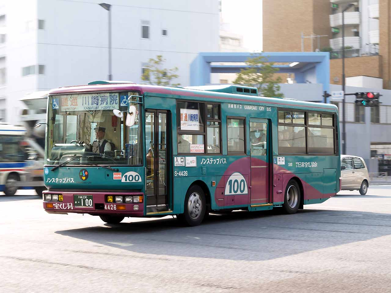 Kawasaki city bus Kawasaki Hospital shuttle. Model: Nissan Diesel KK-RM252GAN License plate: KNK230 A-100（川崎230あ・100） Place: Shinkawa, Kawasaki ward, Kawasaki city, Kanagawa Japan